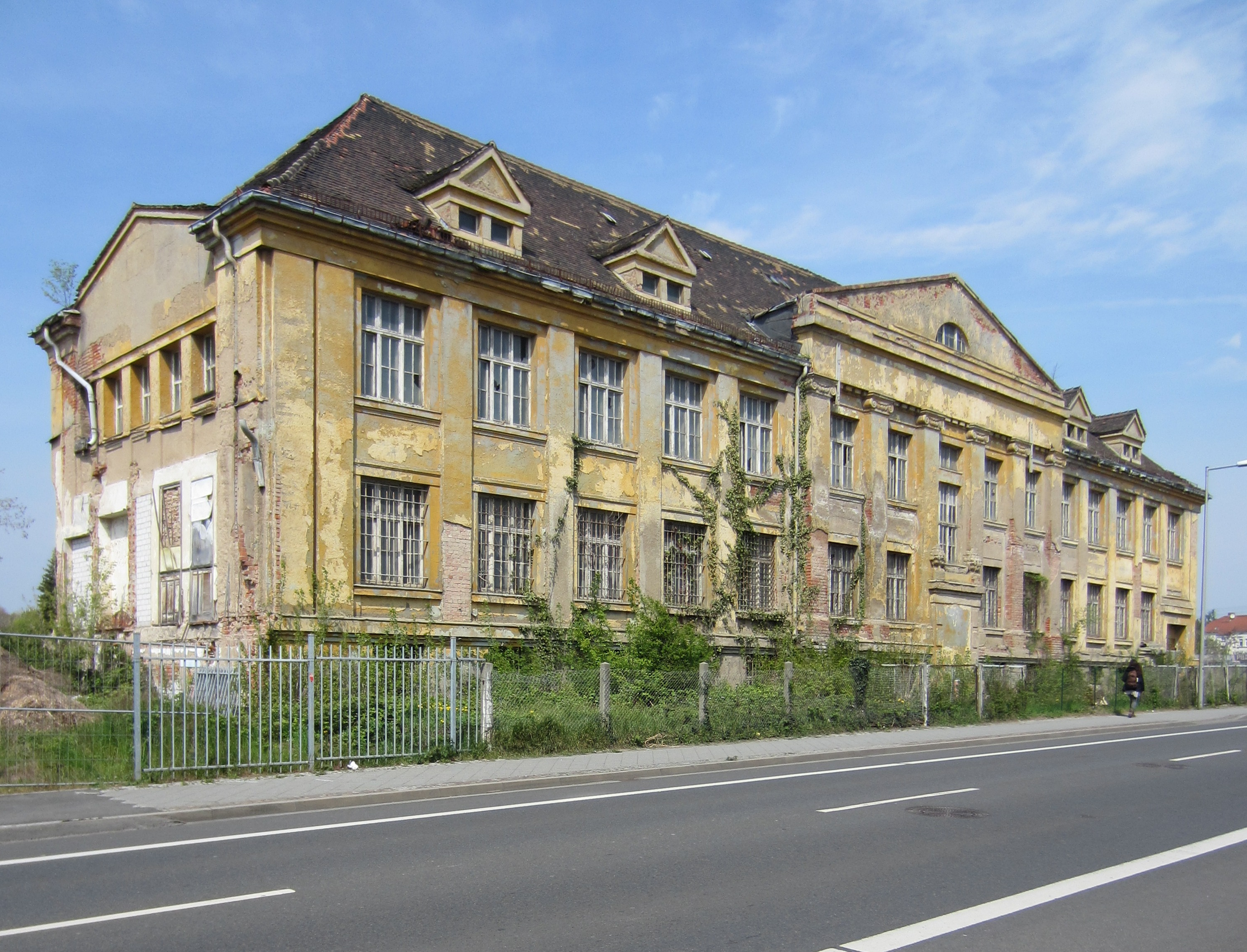 Denkmalgeschütztes Fabrikgebäude Linkelstraße 59 in Leipzig-Wahren.